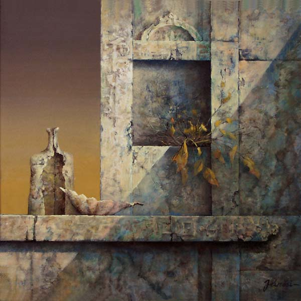 Jánosi Katalin (1951. november 2. - ) magyar festő- és gobleinművész alkotása: Csend, 2003, olajfestmény, 90x90 cm